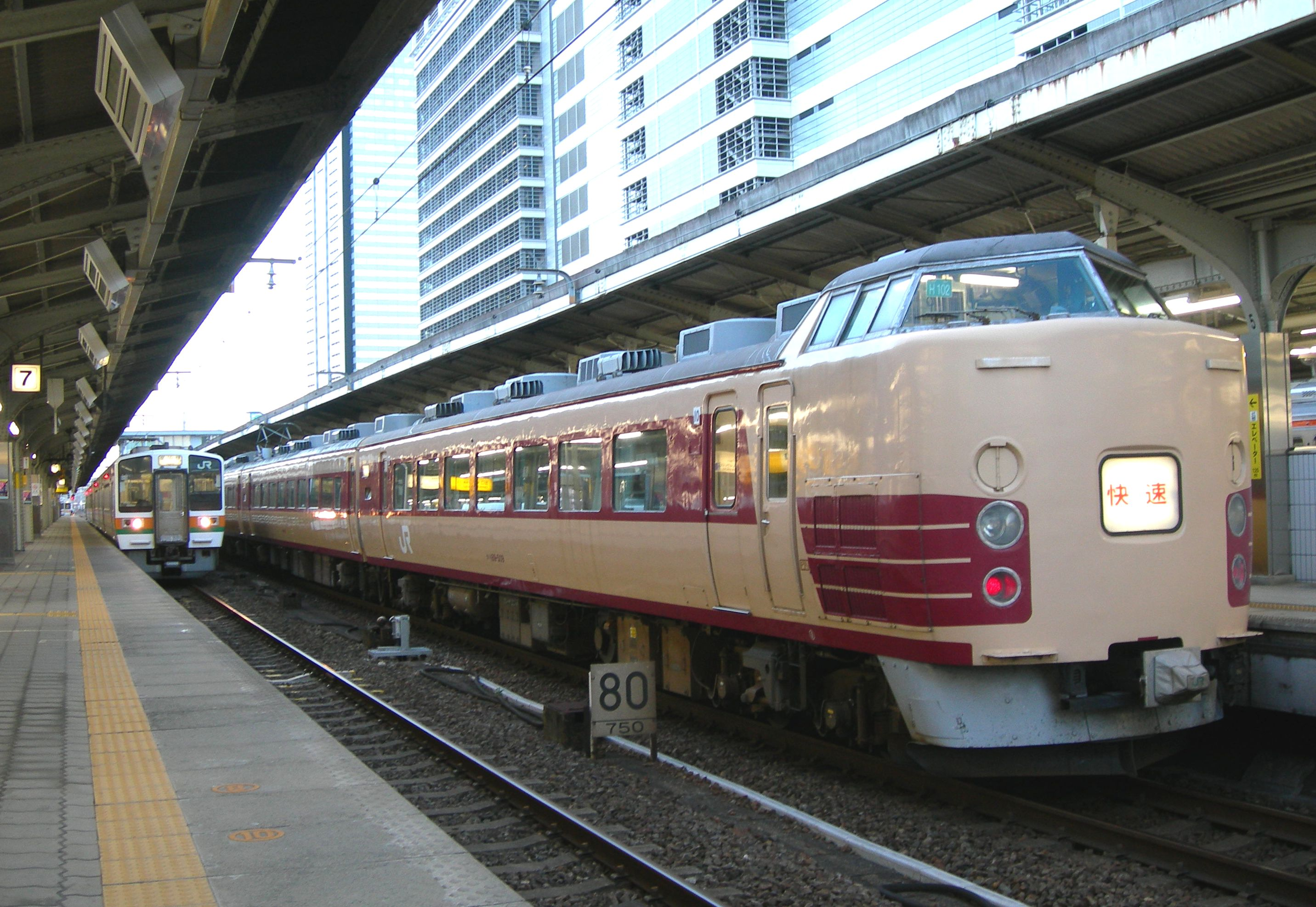 快速ムーンライトながら JR東日本 183系 田町車両センターH102編成